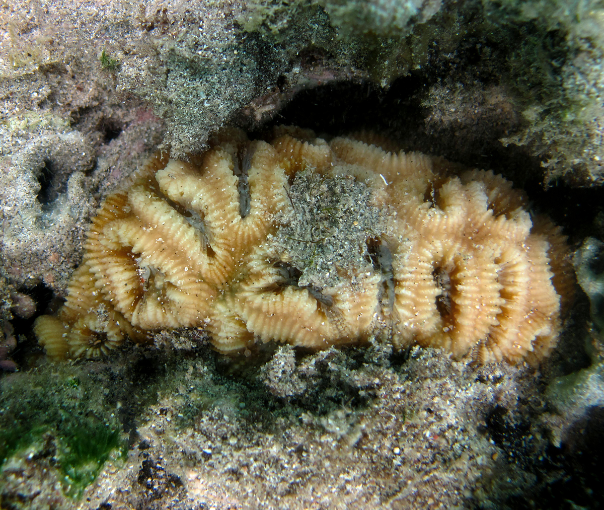 Une colonie de corail Dipsastraea rotumana à la Réunion.